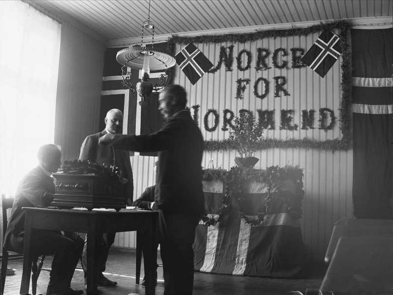 Folkeavstemning om oppløsning av unionen med Sverige, Maridalen skole, interiør, folkeavstemning, valgurne, girlander, flagg, Norge for nordmenn-symbol, menn3.